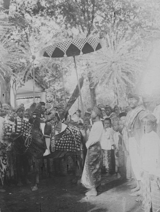 foto. Toeschouwers bekijken de optocht bij een besnijdenisfeest te Pasoeroean, met in het middelpunt de op een versierd paard zittende jongen